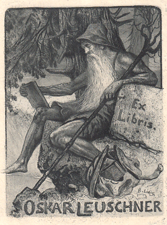 Exlibris über/für Oskar Leuschner von (Georg) Bernhard Liebig, entstanden vor 1920